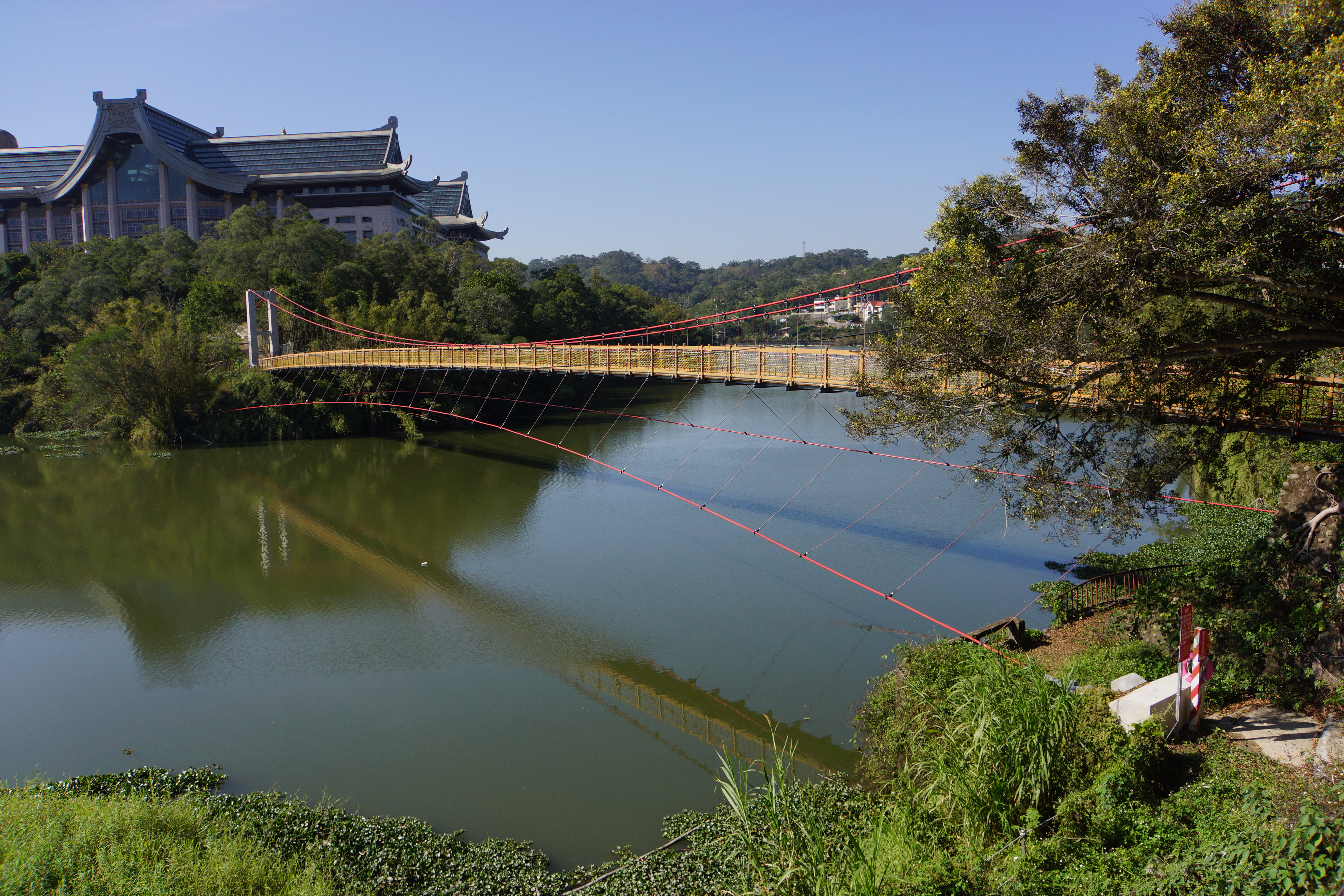 峨眉溪 Emei River